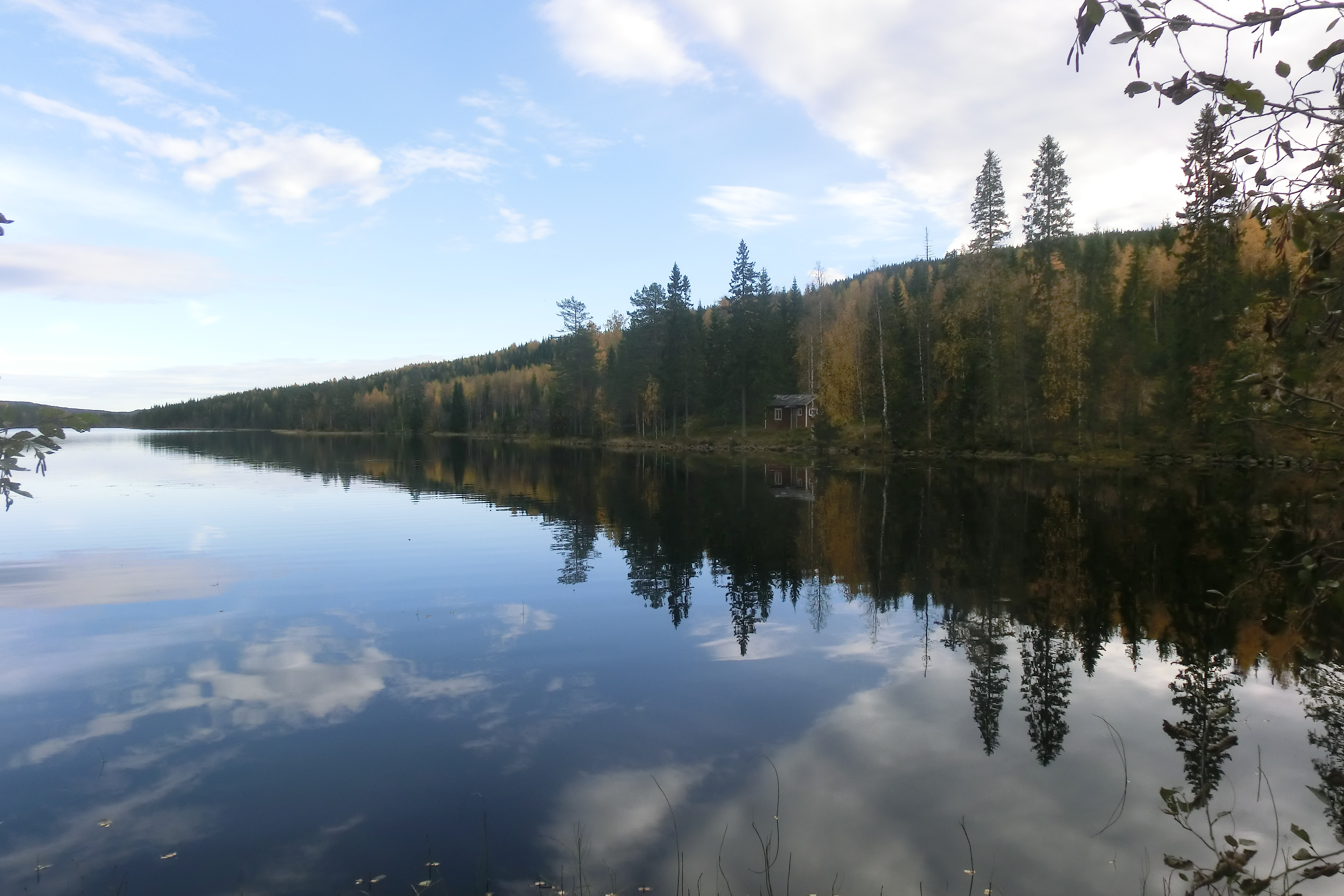 Idsjön, Ångermanland